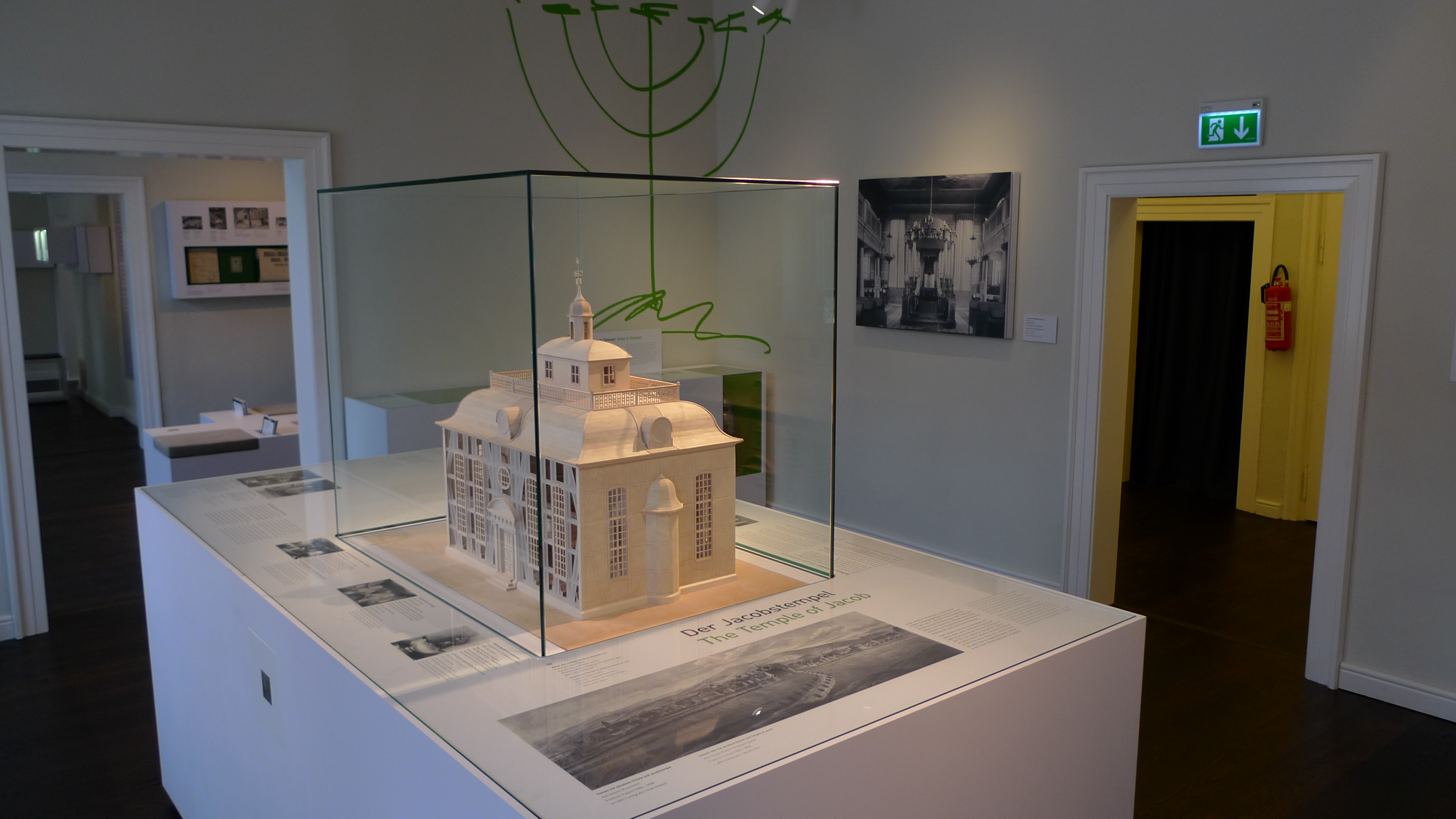 Modell (Maßstab 1:33) der im November 1938 zerstörten Synagoge Seesen, der sogenannte Jacobstempel. Fotografiert im Städtischen Museum Seesen.